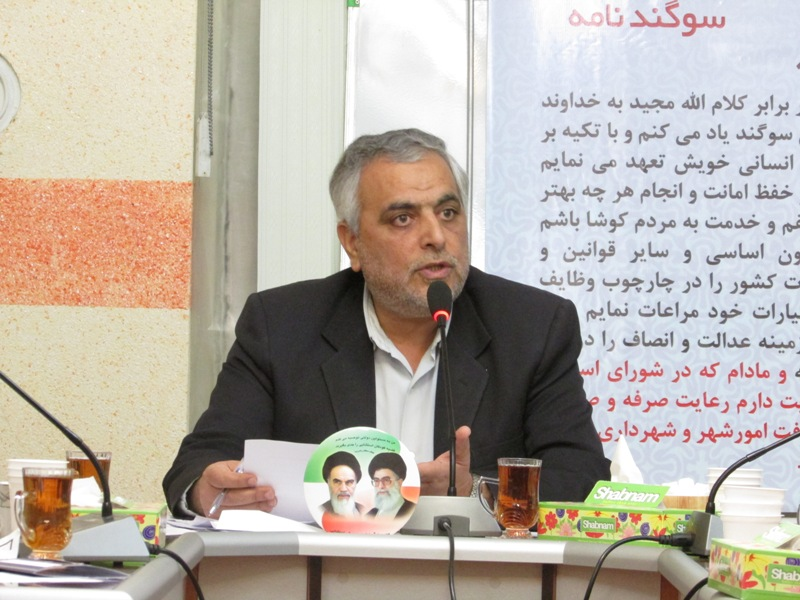 مهندس حسینی در منصب رییس، در شورای شهر کاشمر